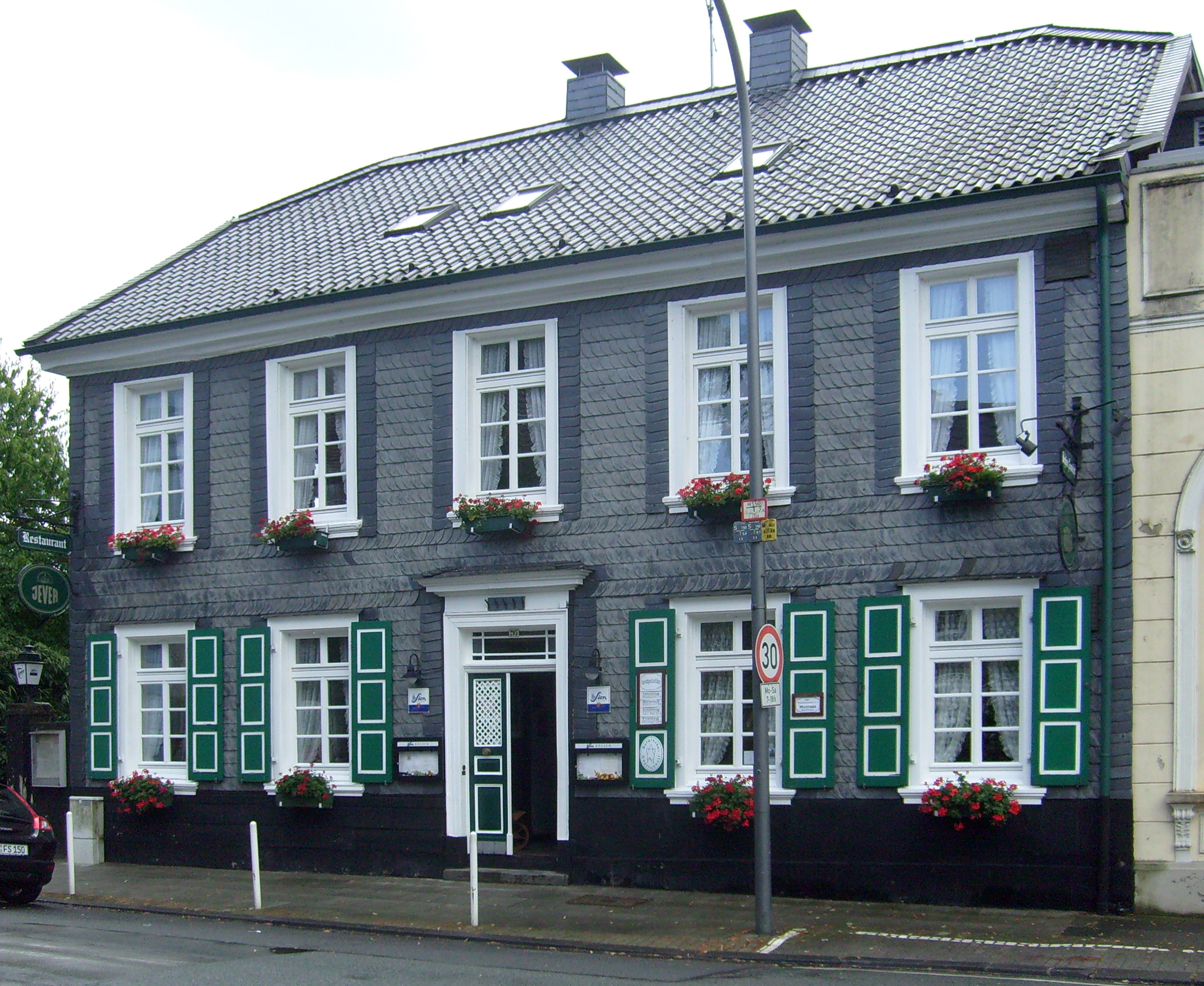 Restaurant Schöne Aussicht an der Nützenberger Straße in Wuppertal-Elberfeld